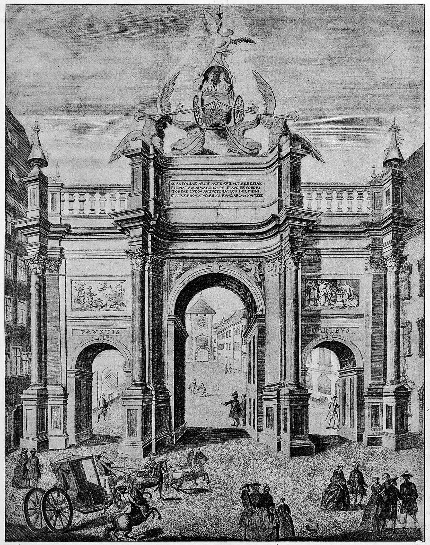 Landständische Ehrenpforte Nach einer vom Hofphotograph C. Ruf verfertigten Aufnahme des von Peter Mayr angefertigten Stiches in der landständischen Festschrift Schauinsland 1899